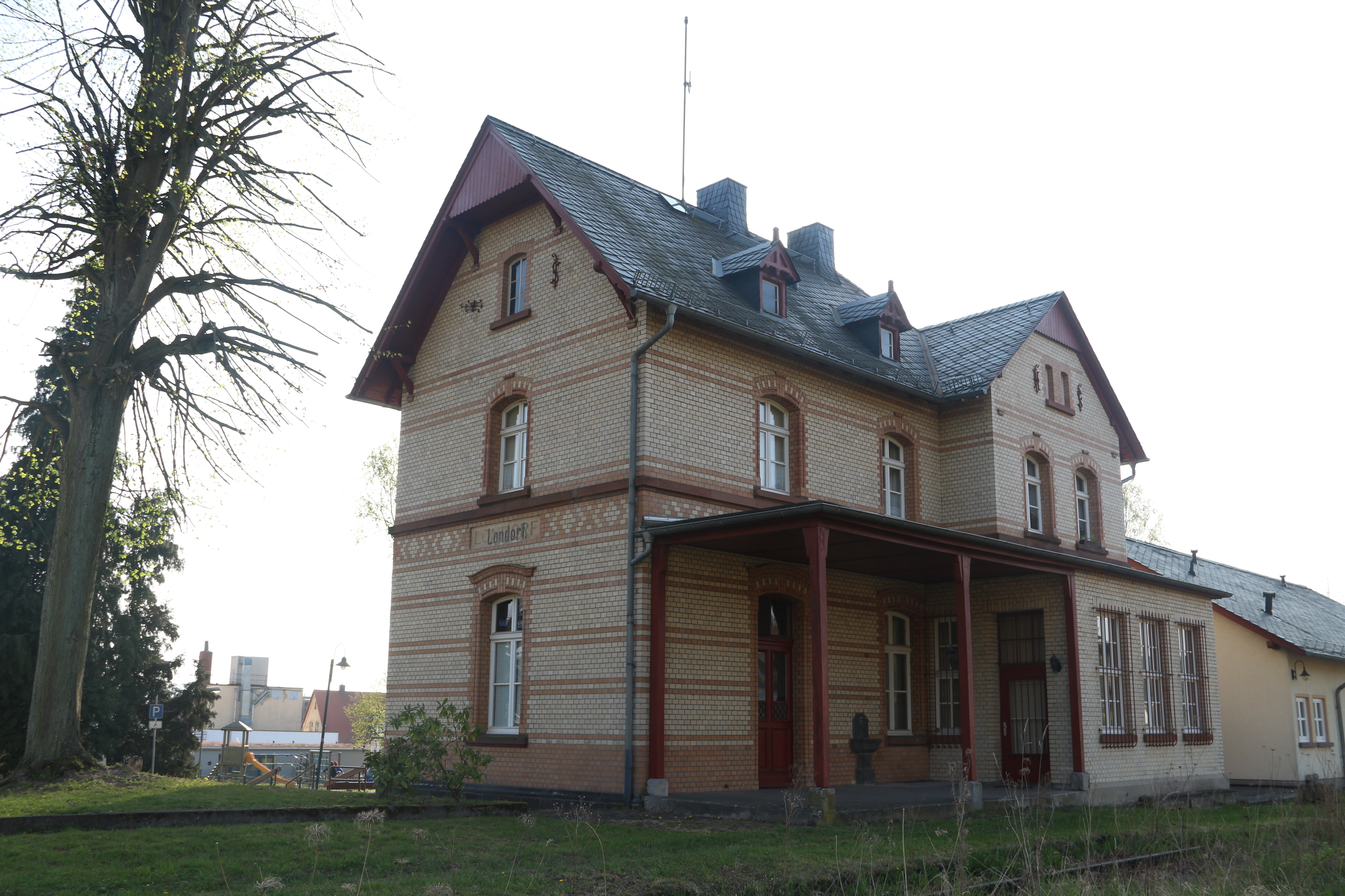 Bahnhof Londorf